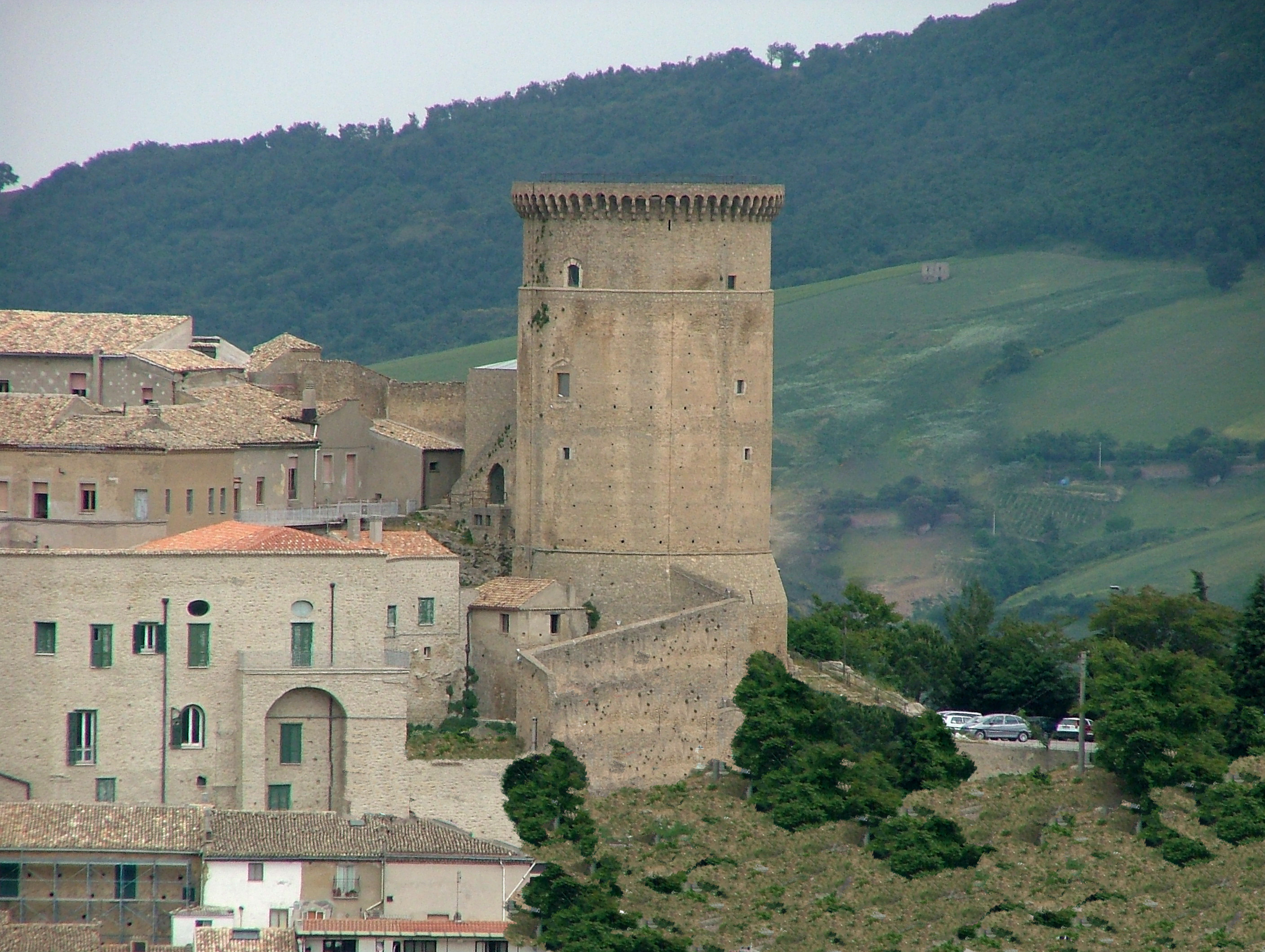 Torre normanna (XI sec.)ed attiguo convento di S. Chiara (XIV sec.), edificato, quest'ultimo, inglobando le strutture dell'antico castello. Autore Rocco Stasi, fatta da me Licenza GFDL